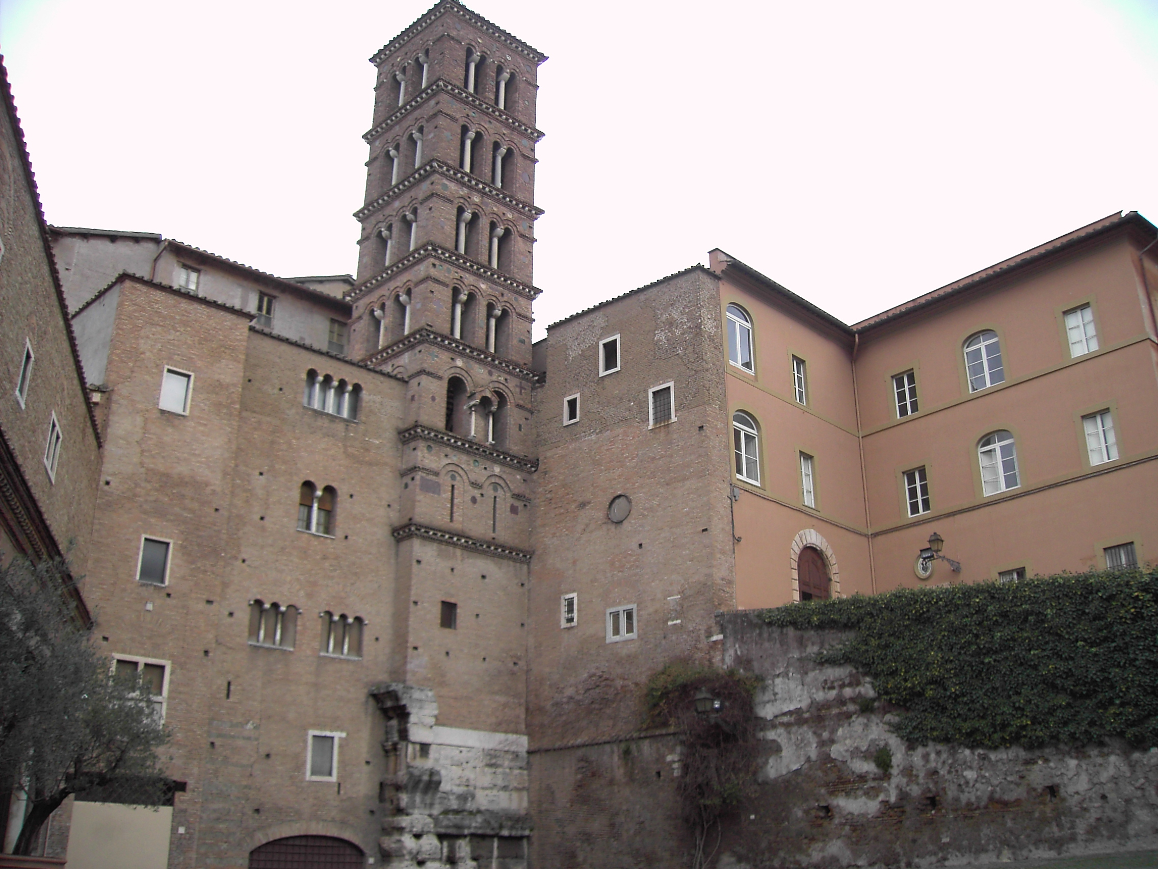 Roma, Basilica dei santi Giovanni e Paolo al Celio - Piazza e campanile. Il campanile ingloba nella base i resti del tempio romano del Divo Claudio.